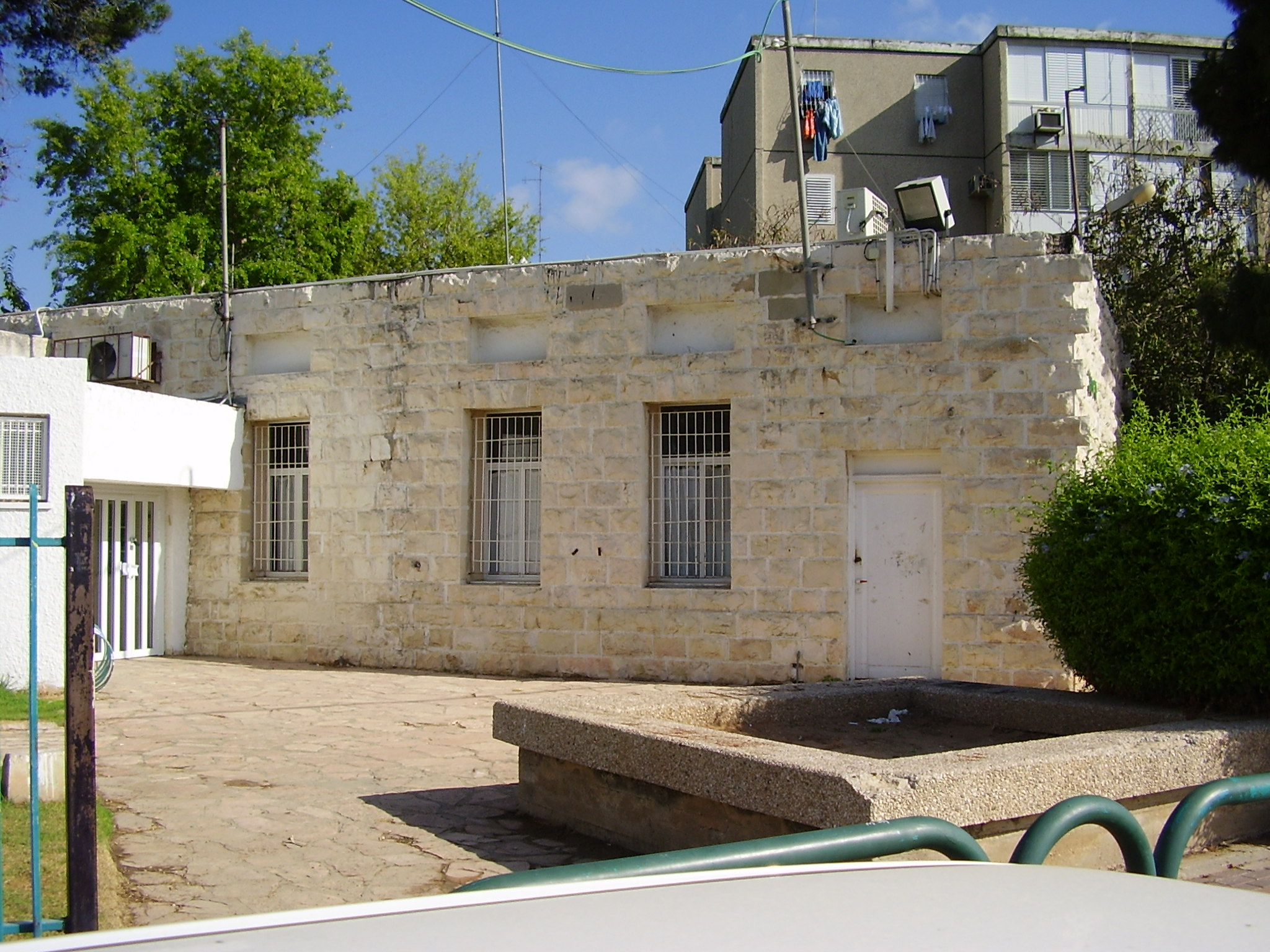 בית האבן